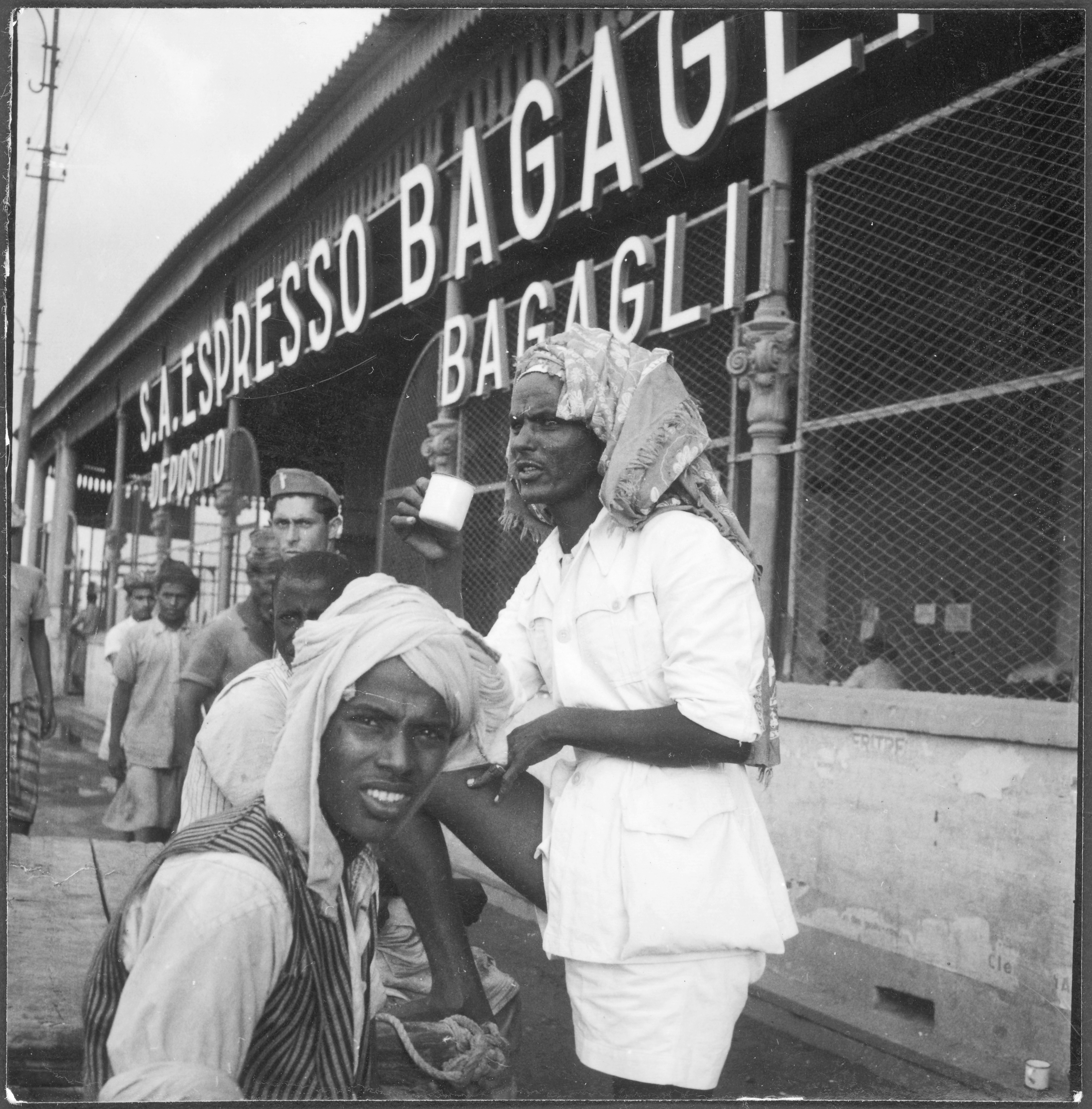 Italienisch-Ostafrika, Massana (Massawa, Massaua): Hafen; Männer vor einem Kaffeeshop